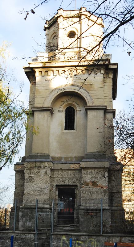 Der Währinger Wasserturm der Kaiser-Ferdinandswasserleitung in Wien